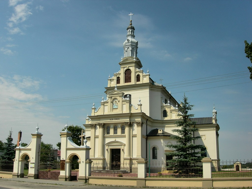 Jedlnia - kościół par. p.w. śś. Mikołaja i Małgorzaty (1790-92)